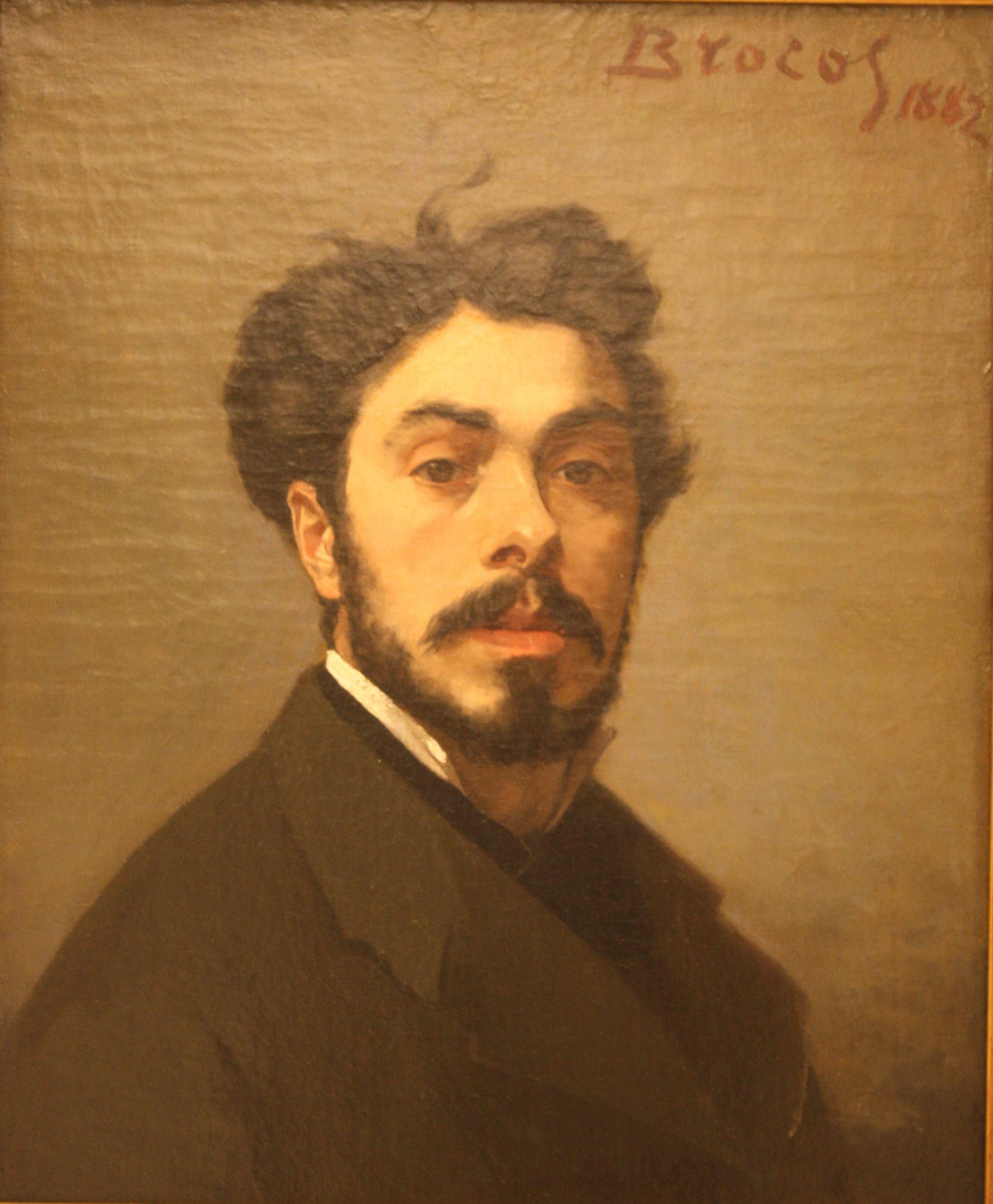 Modesto Brocos Gómez (1852-1936): Autorretrato (1882), exposto no Museo de Pontevedra.